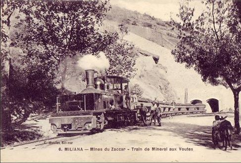 Miliana - Mines du Zaccar - Train de Mineral aux Voutes